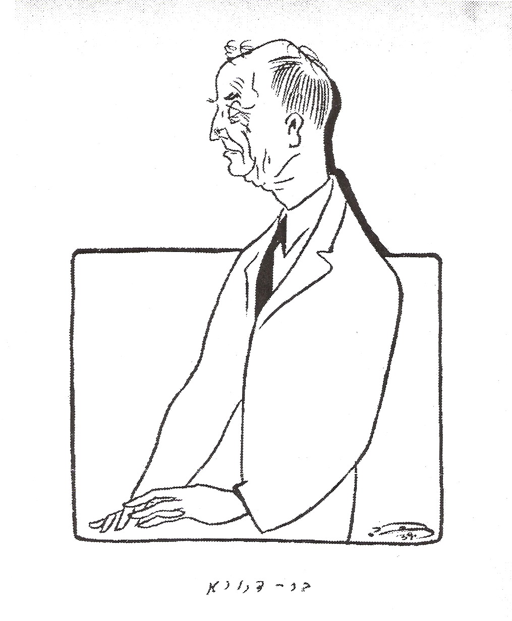 סריקה מתוך הספר "פני תל-אביב בקריקטורות" שיצא בת"ש